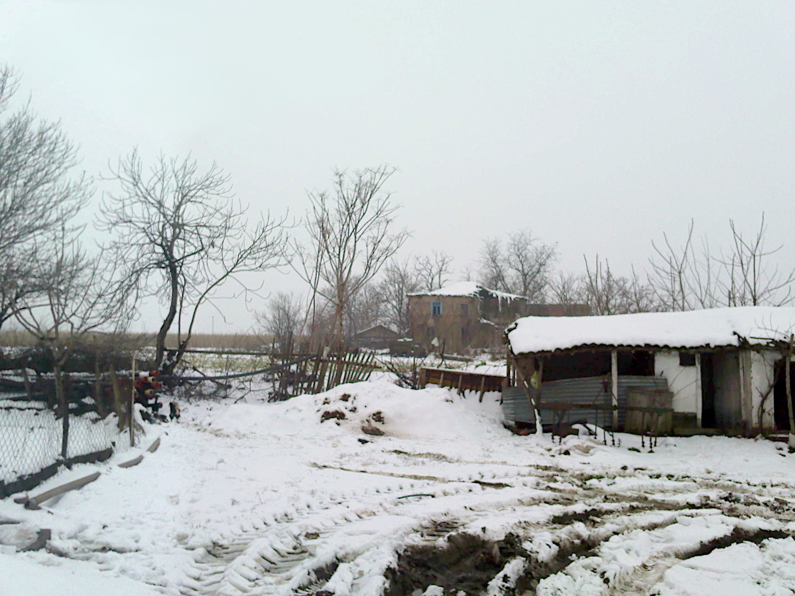 sazlıca